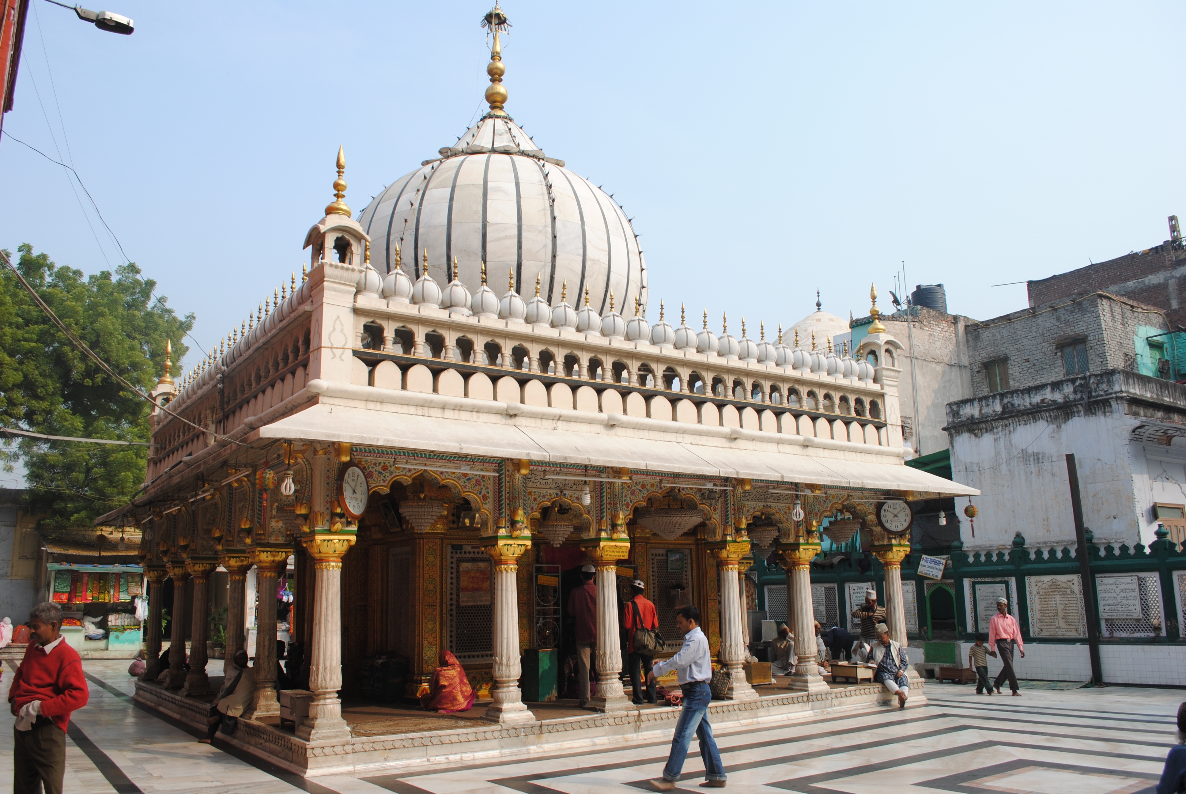 mausoleum of 13th C Sufi saint, Nizamuladdin Aulya, Delhi, India مقبره صوفی سده هفتم نظام‌الدین اولیاء٬ دهلی٬ هند